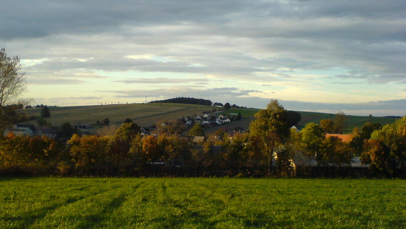 Blick vom Feld über Leubsdorf in Richtung Siedlung